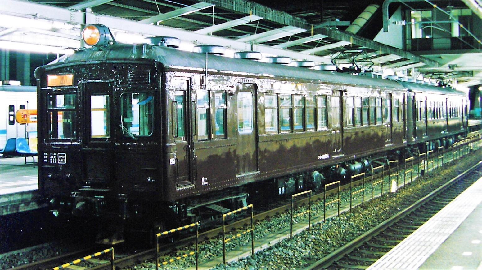 鉄道省モハ40形電車 40054・40074